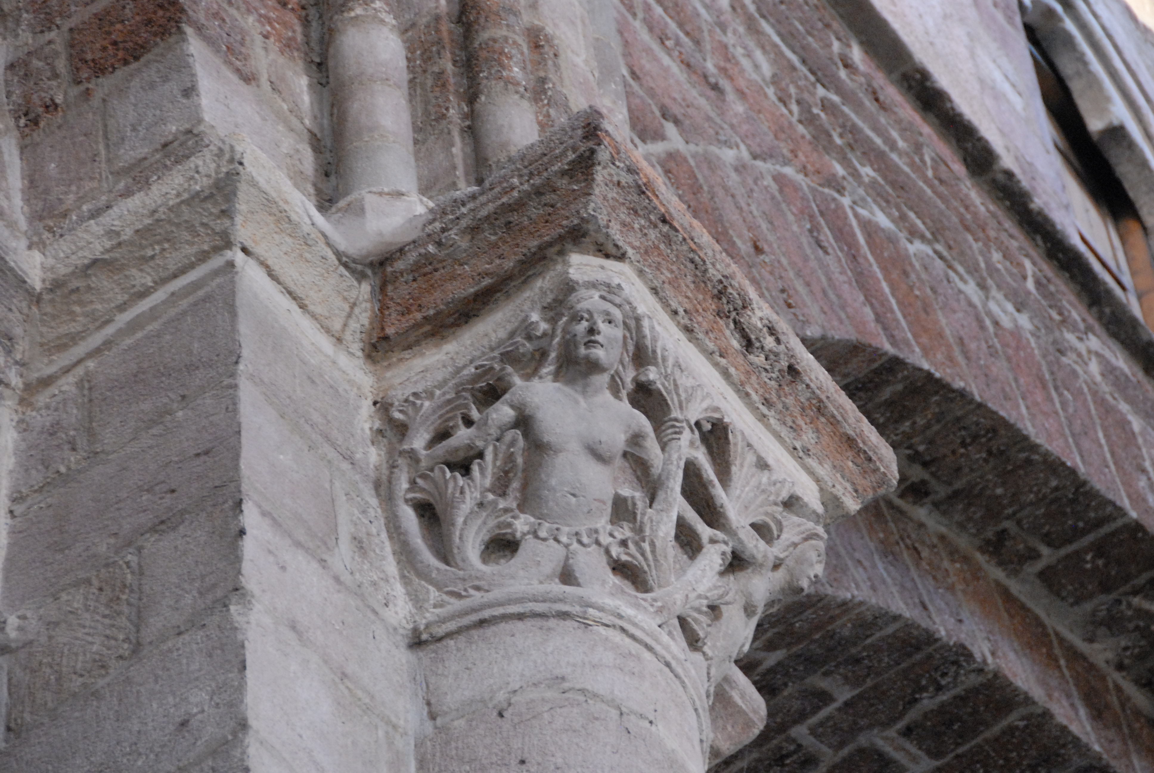 St.-Julien Brioude, Kapitell, Nixen mit geteilten Schweifen